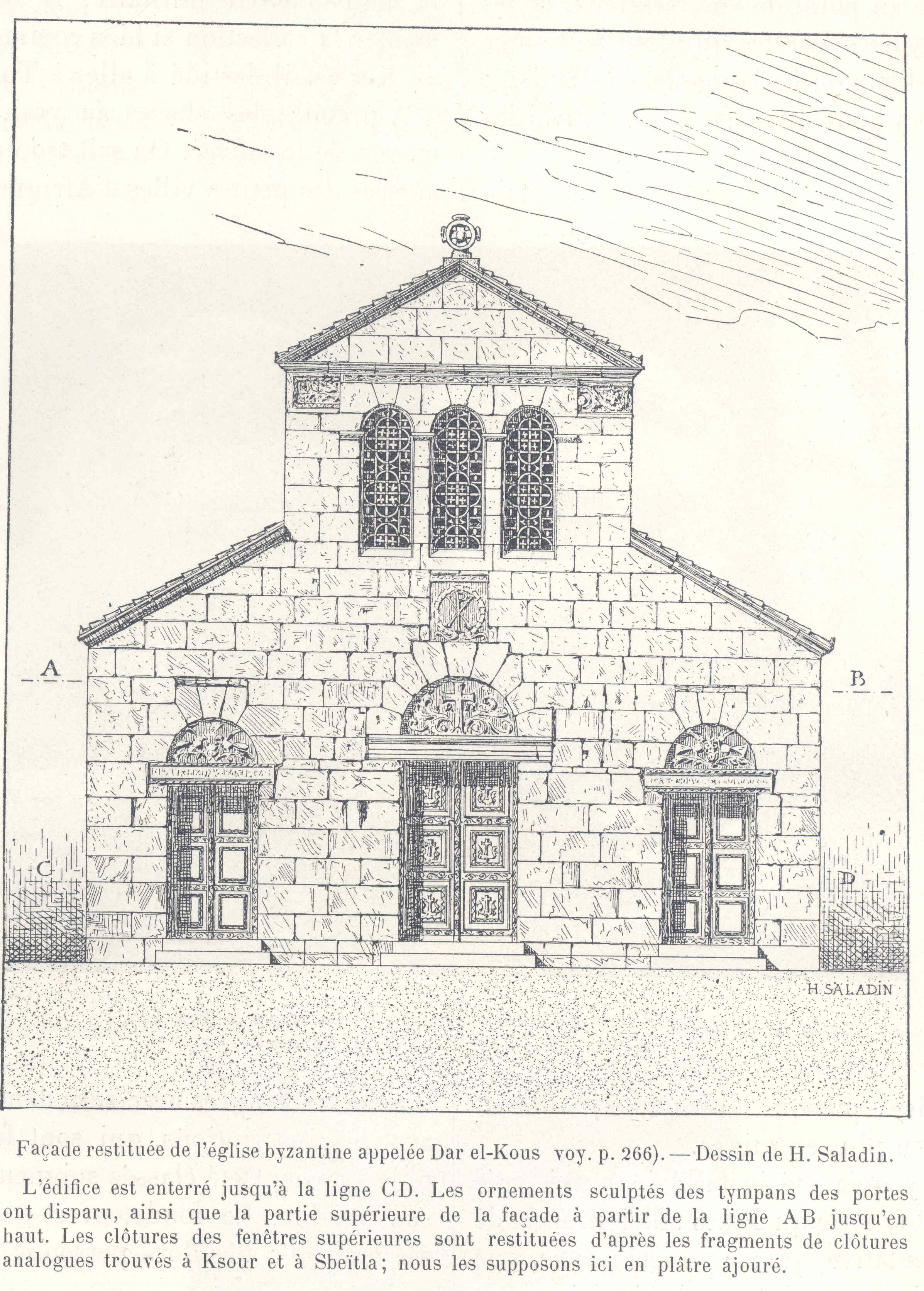 Façade restituée par Henri Saladin de la basilique Dar el Kous au Kef